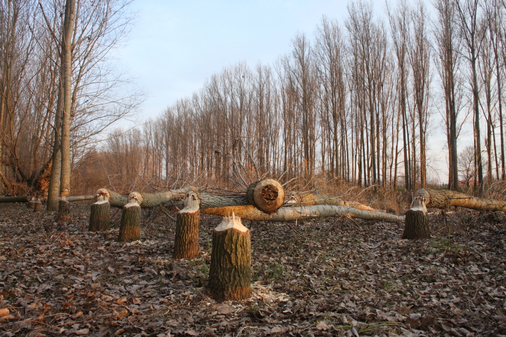 Hódrágás a Rábca folyón Rábcakapinál